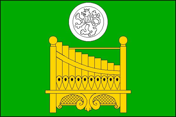 Vlajka obce Cítoliby